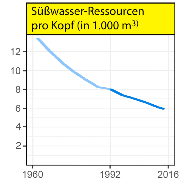 Süßwasser-Ressourcen nach „World Scientists’ Warning to Humanity: A Second Notice“ 2017